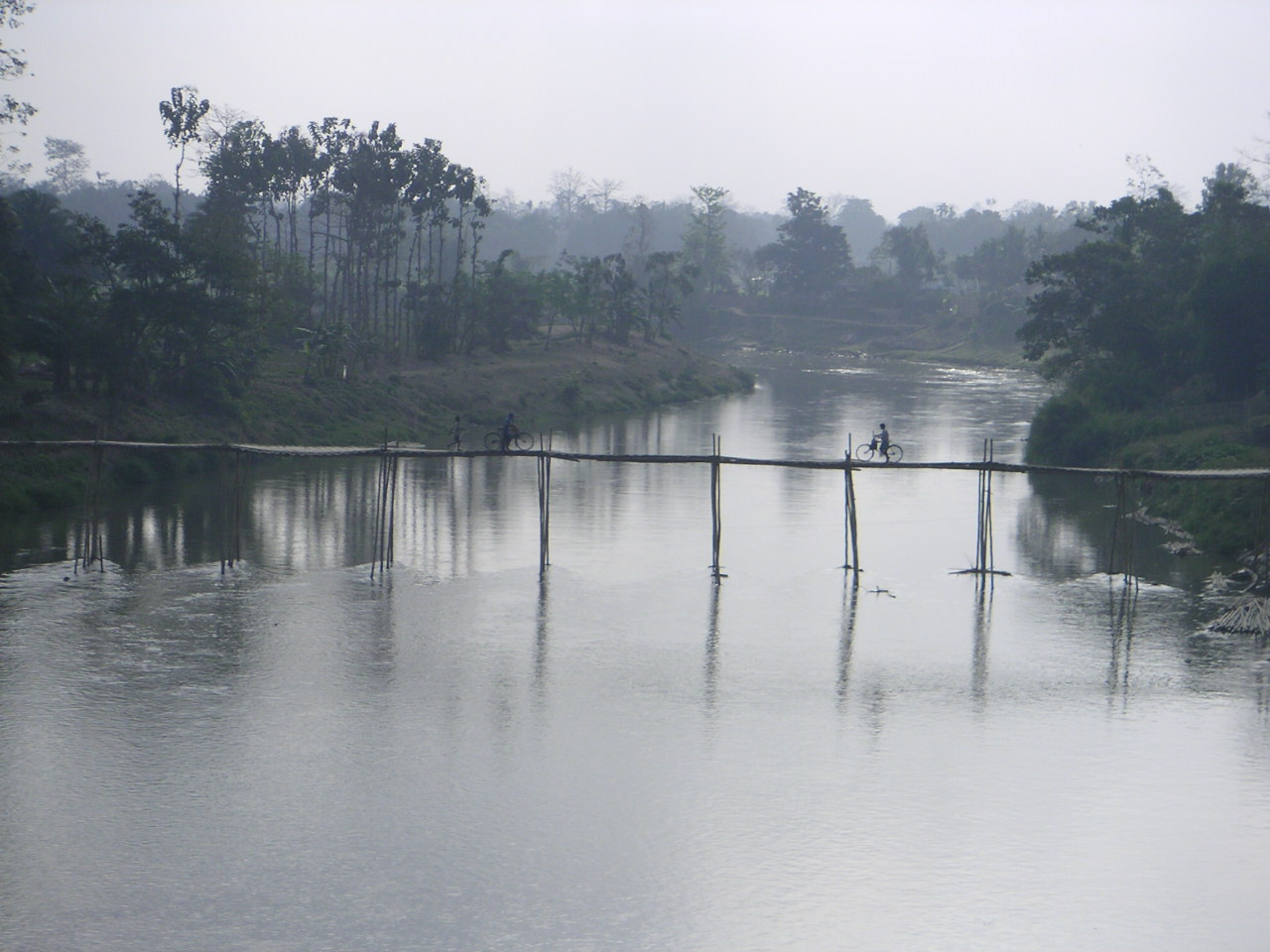 Amarpur, Tripura. Photo: Soman